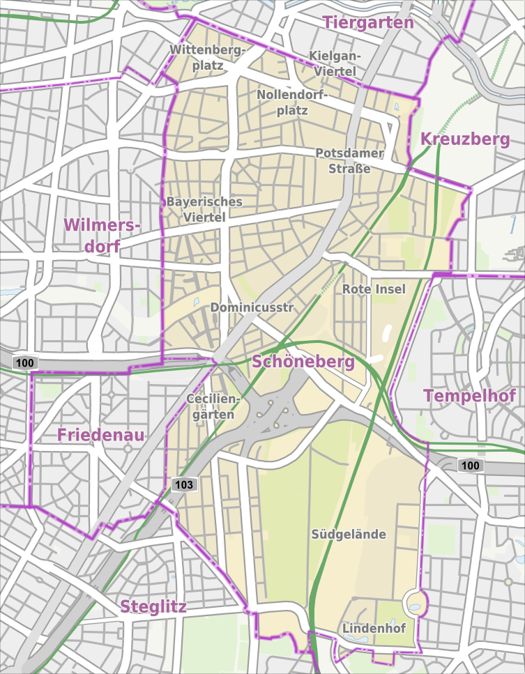 Übersichtskarte der Straßen und Ortslagen in Berlin-Schöneberg